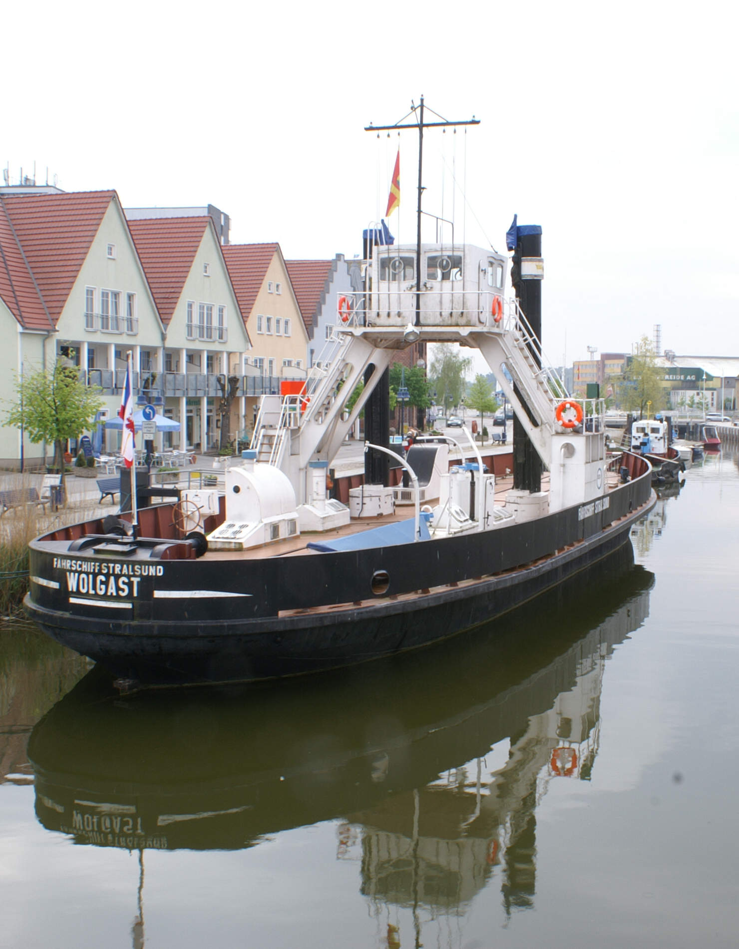 Fährschiff Stralsund im Wolgaster Museumshafen